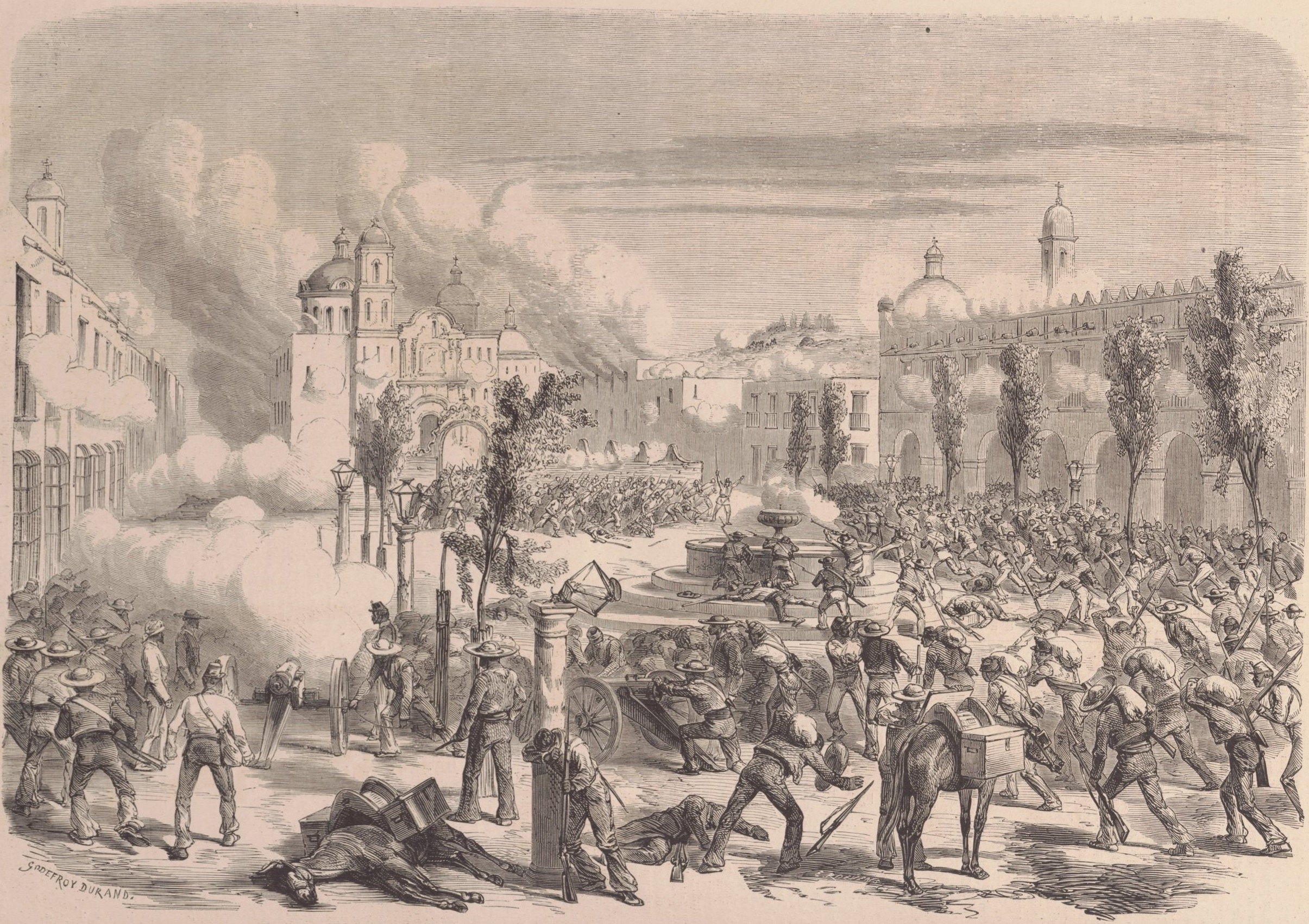 Mexique. — Défense héroïque du bataillon belgue commandé par le major Tydgadt dans Tacamburo, le 11 avril 1865. (D'après le croquis de M. A. Martin).